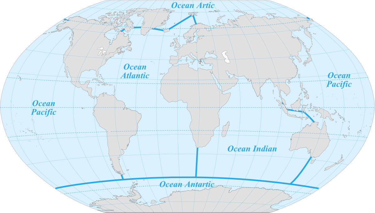 Limits dels cinc Oceans